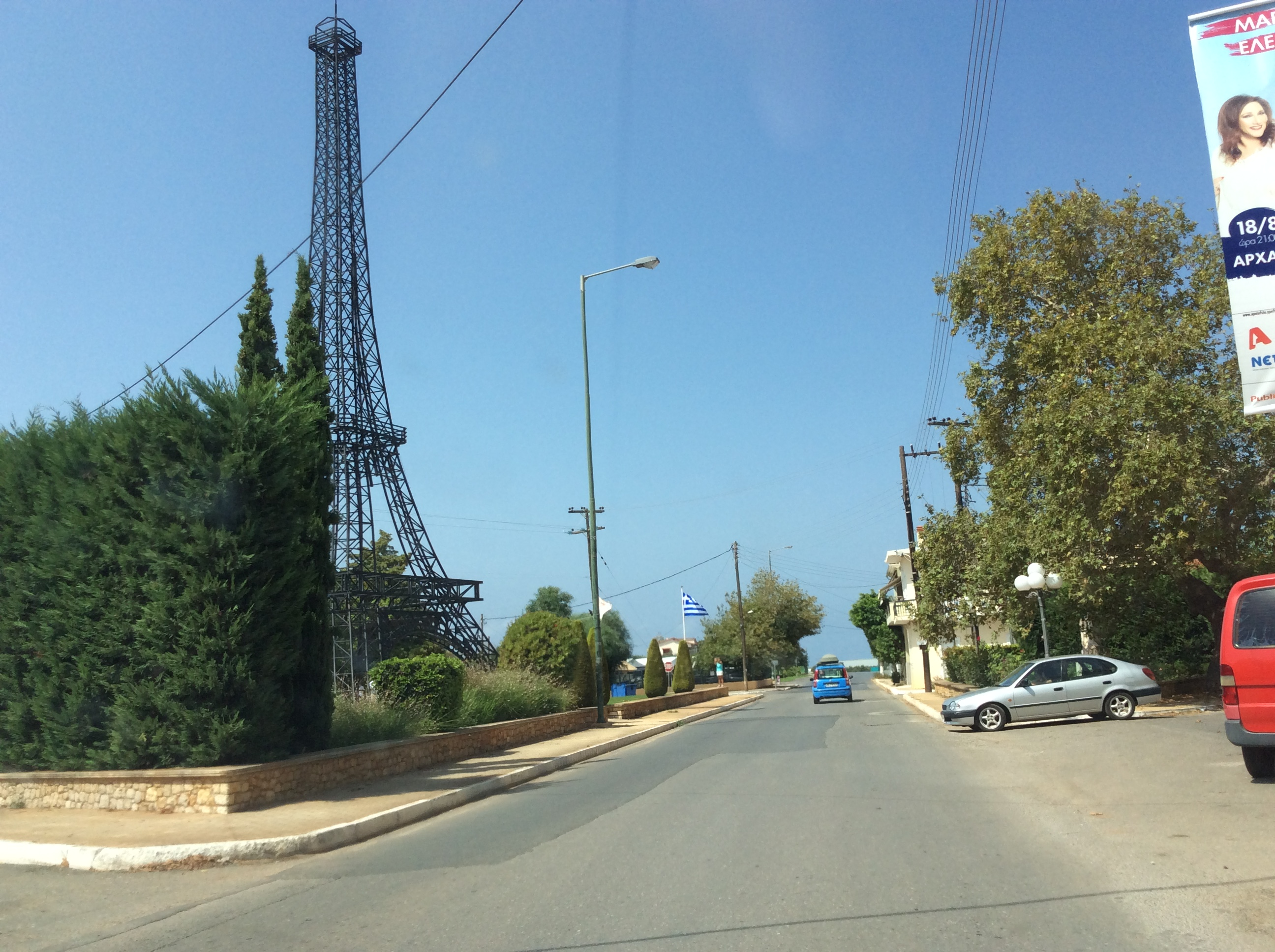 Φιλιατρά Μεσσηνίας. Ομοίωμα του Πύργου του Άιφελ.